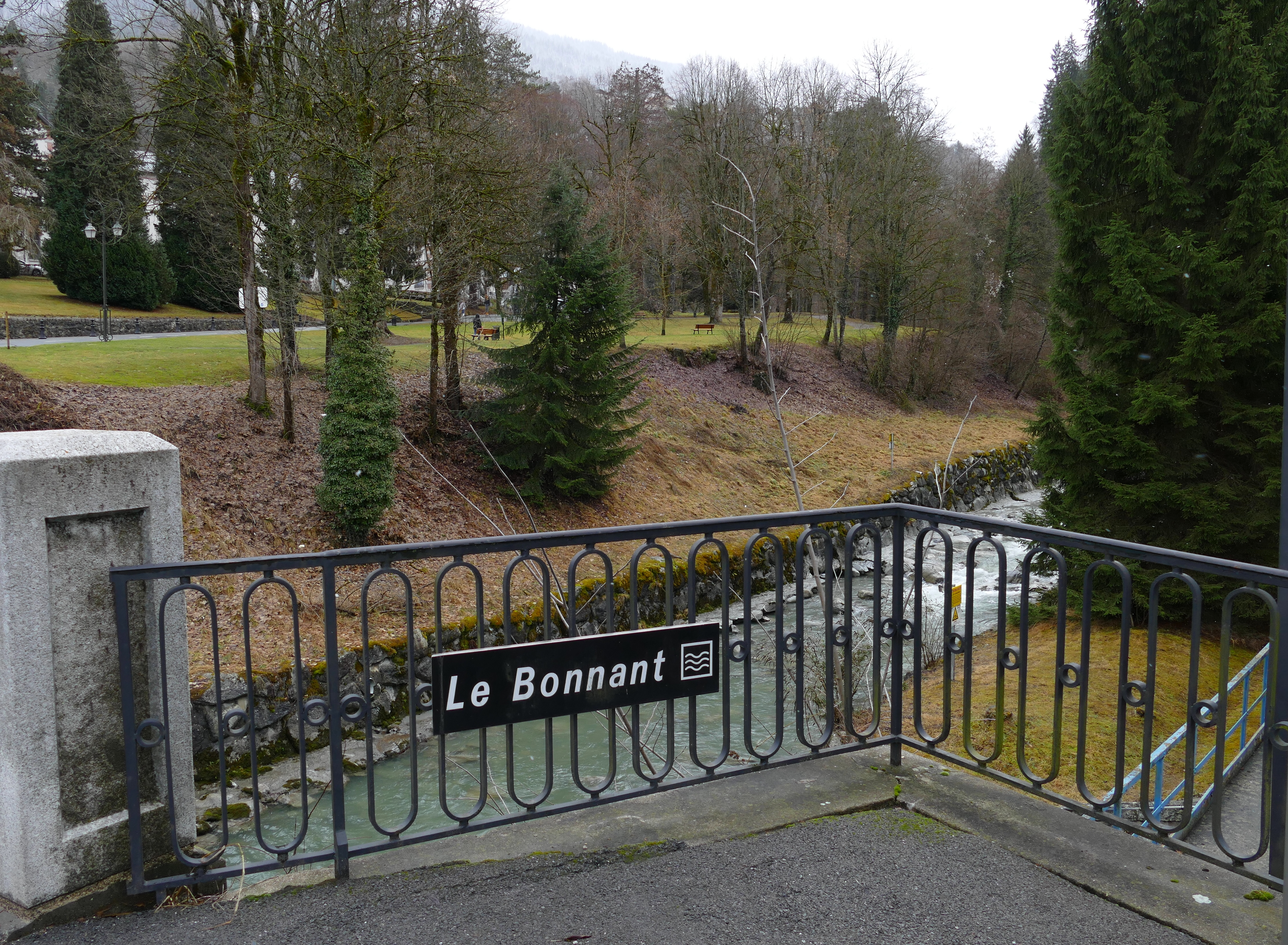 Le torrent Le Bonnant ou Bon Nant au Fayet (Saint-Gervais-les-Bains, Haute-Savoie), longeant le Parc Thermal.